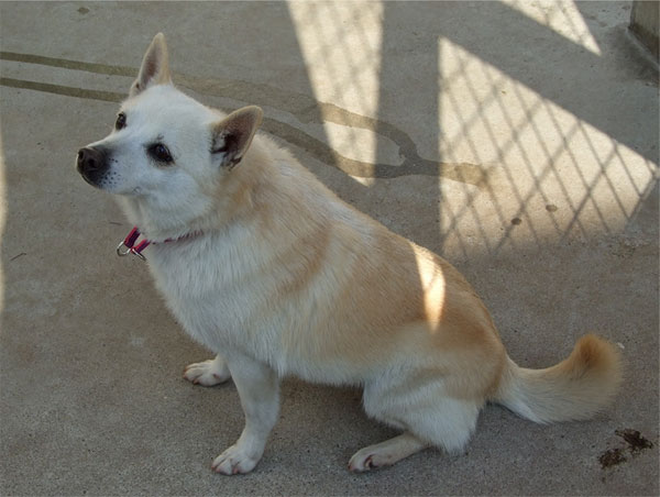 珍しいクリーム色のスキッパーキ。断尾もしていない。